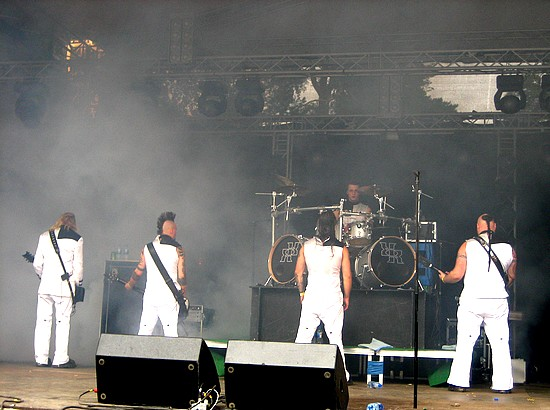 Ruoska-yhtye